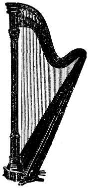 Dubbelpedalharpa